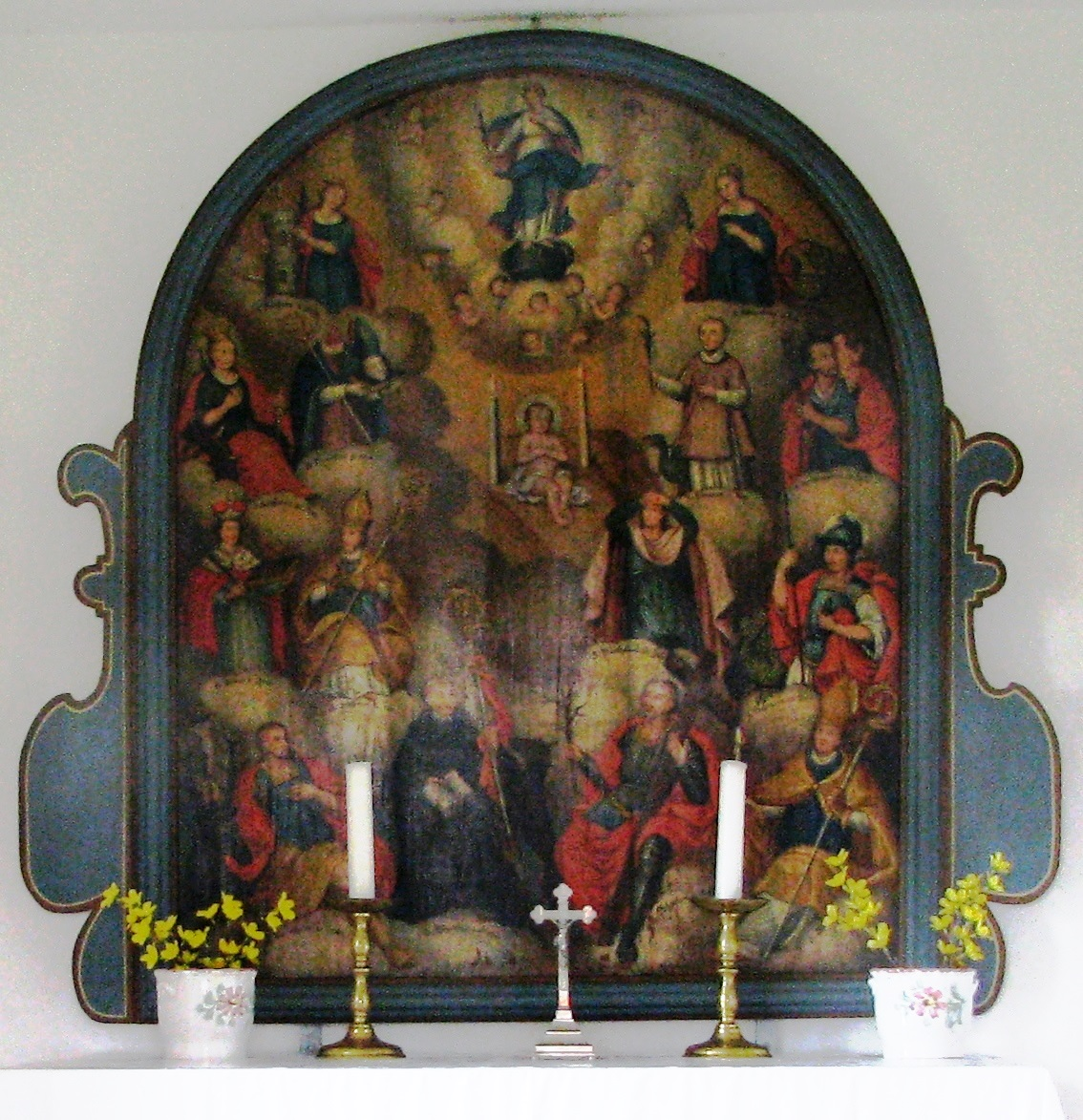 Möningerberg bei Möning, Ortsteil von Freystadt im Landkreis Neumarkt in der Oberpfalz, 14-Nothelfer-Altarbild in der Kapelle von 1794